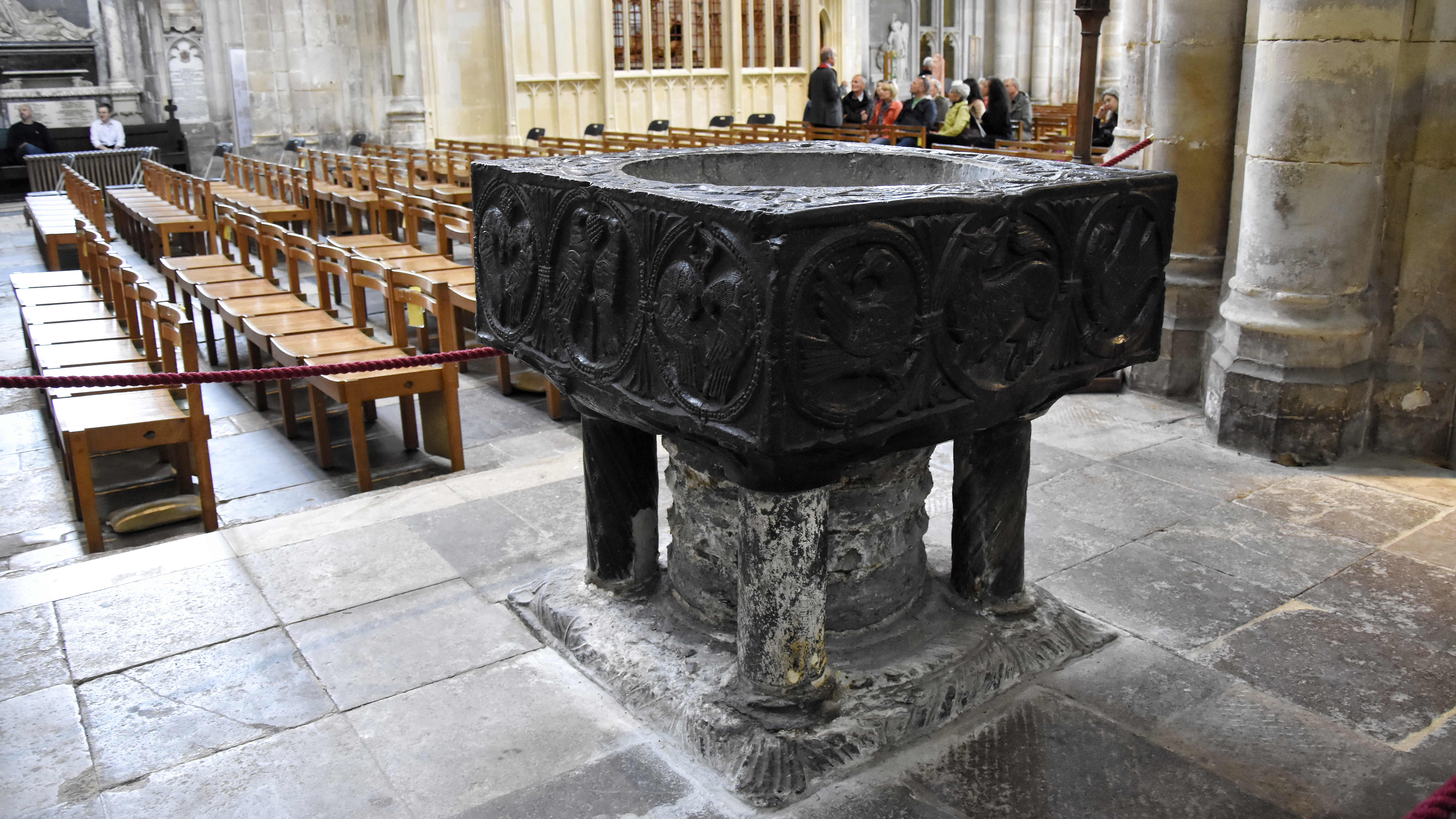 Doornikse doopvont - Winchester Cathedral